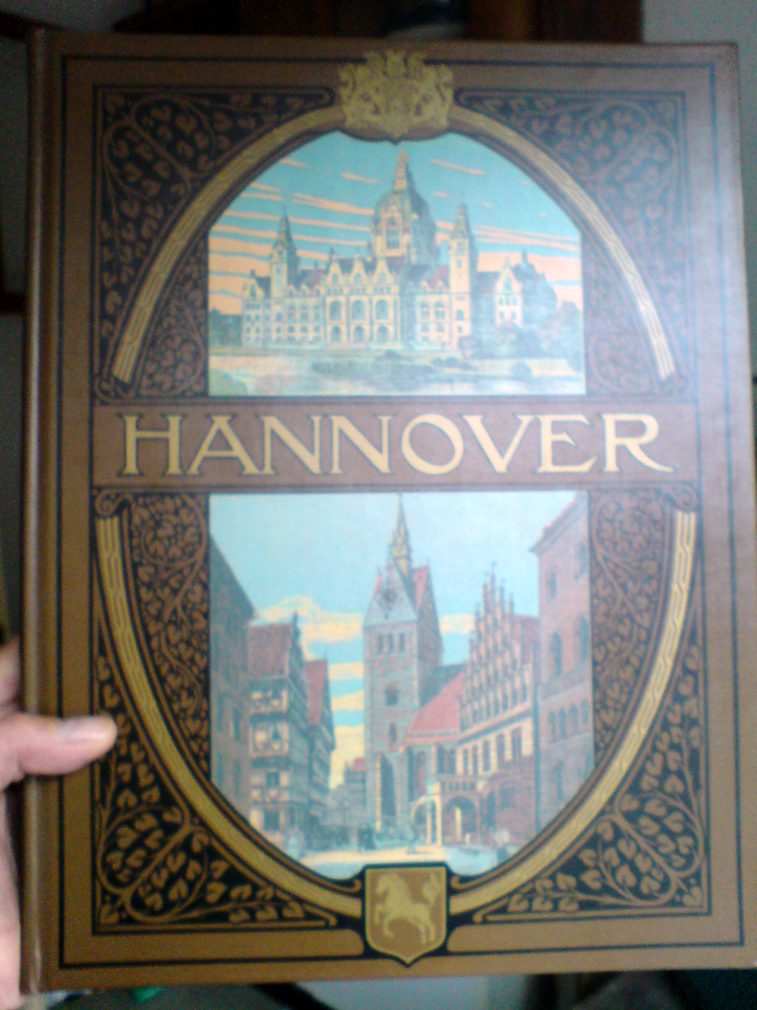 Titelbild "mit Daumen in der Küche" (eigenes "Kunstwerk", sonst wären evtl. Urheberrechte verletzt) auf dem Umschlag des Buches "Hannover in Wort und Bild, hrsg. vom "Verein zur Förderung des Fremdenverkehrs in Hannover, Text von dem Verleger Adolf Kiepert), Hannover 1910 (ursprüngliche Erstauflage).